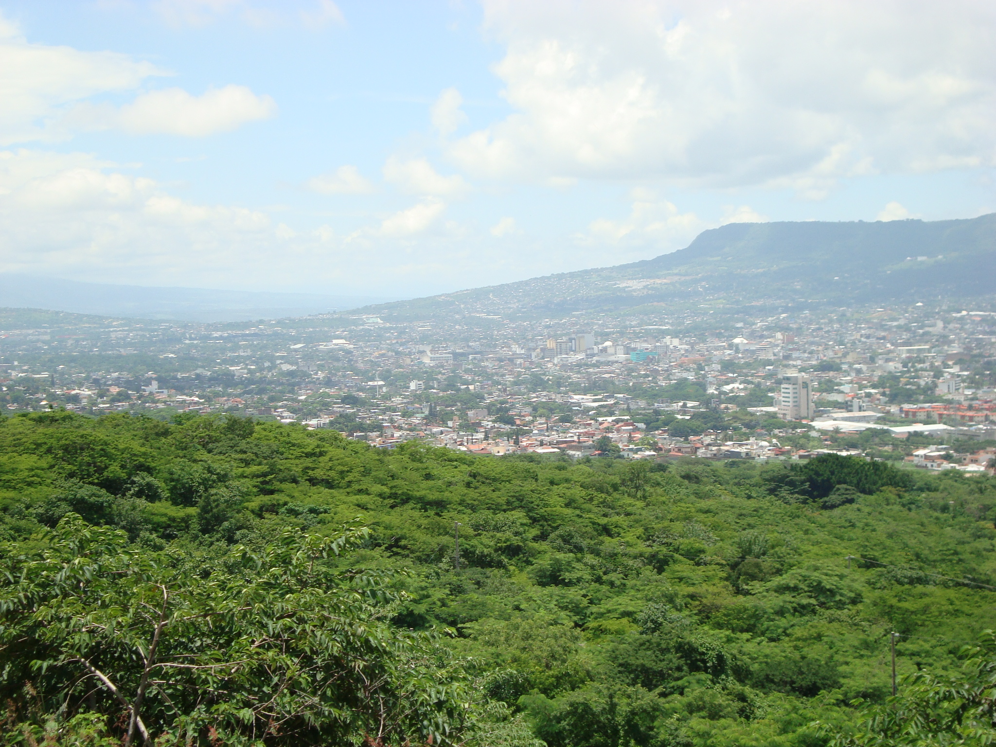 Foto tomada desde el mirador de los Amorosos.